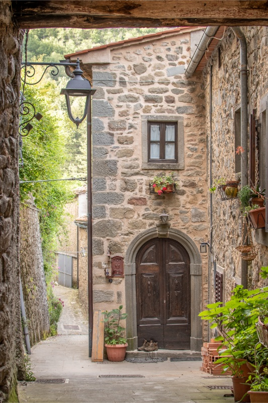 scorcio di Via Ciliegio - Calamecca